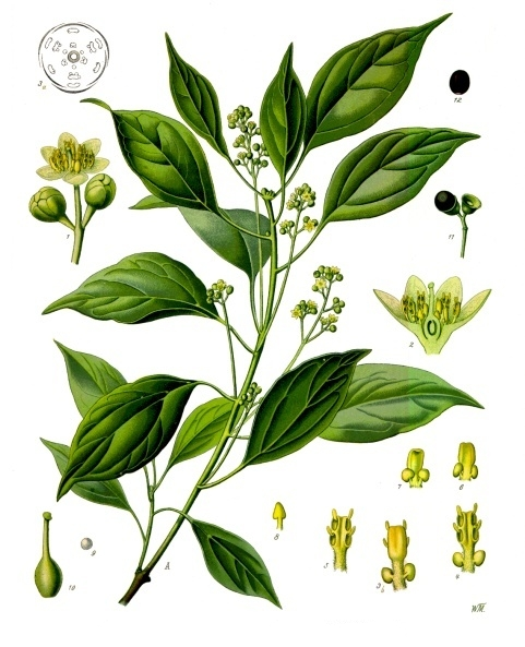 Kampferbaum. A blühender Zweig, natürl. Grösse; 1 Blüthen, auf verschiedenen Entwicklungsstufen vergrössert; 2 Blüthe im Längsschnitt, desgl.; 3a Blüthengrundriss, desgl.; 3b u. 4 fruchtbares Staubgefäss der inneren Reihe, von verschiedenen Seiten, desgl.; 5 fruchtbares Staubgefäss der äusseren Reihe; 6, 7 unfruchtbares Staubgefäss der äusseren Reihe von verschiedenen Seiten, desgl.; 8 unfruchtbares Staubgefäss der innersten Reihe, desgl.; 9 Pollen, desgl.; 10 Stempel, desgl.; 11 Fruchtbecher mit Frucht, desgl.; 12 Frucht ohne Fruchtbecher, desgl.